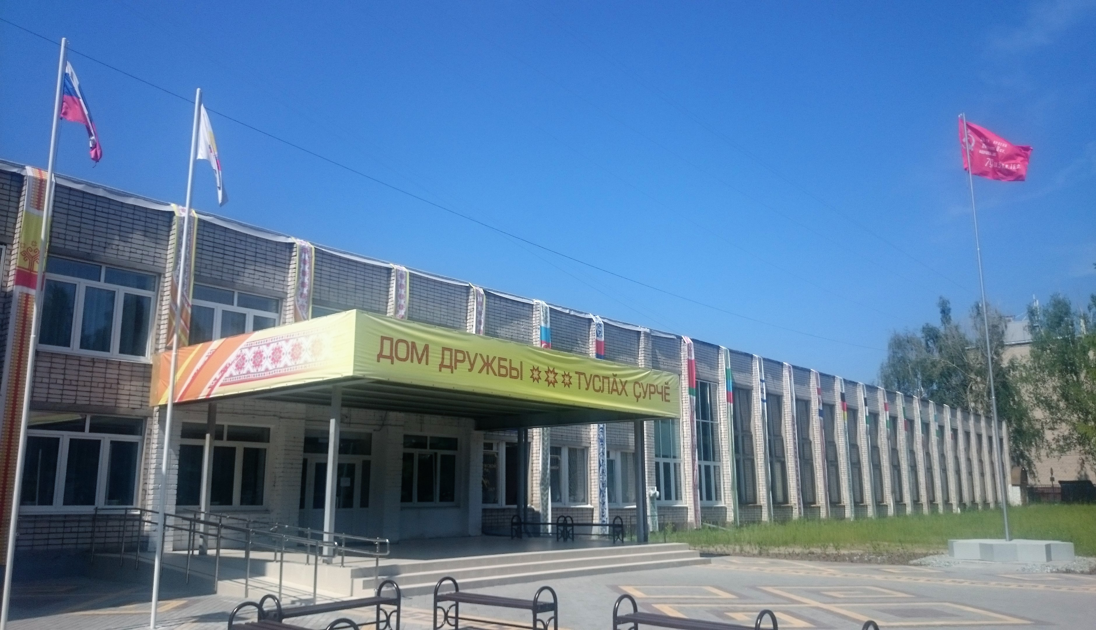 Дом дружбы Чебоксары 26 июня 2018 год